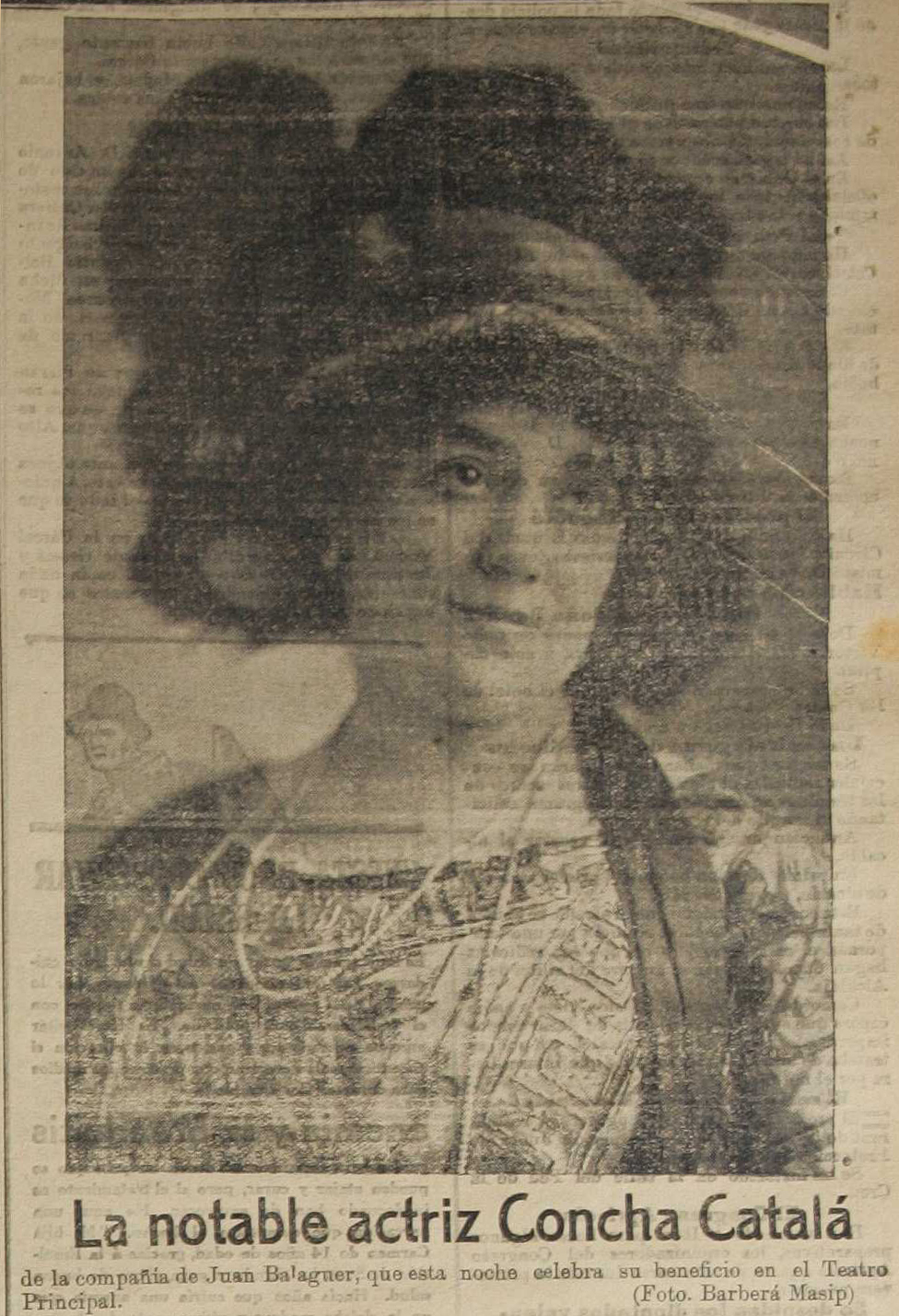 «La notable actriz Concha Catalá», en el periódico Diario de Valencia.